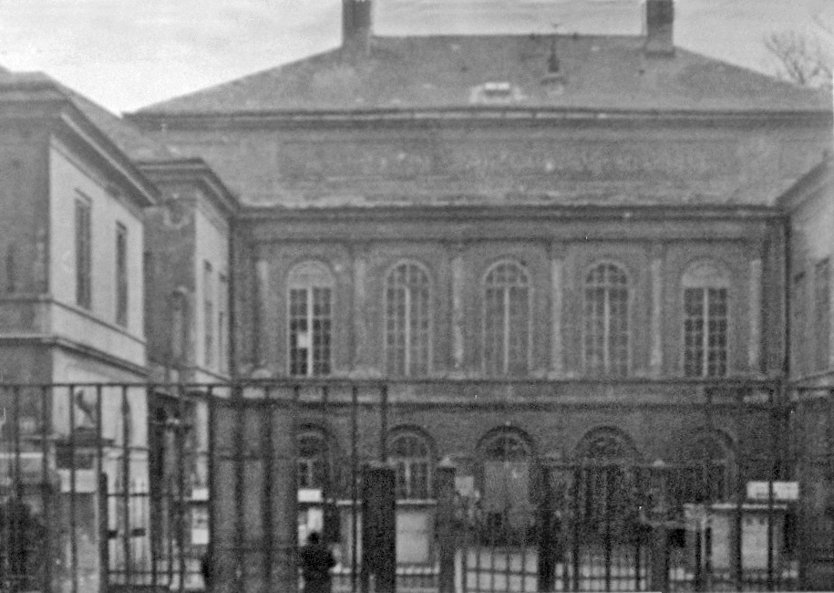 Czartoryski-Schlössel, Straßenfront. Inv. PK 612